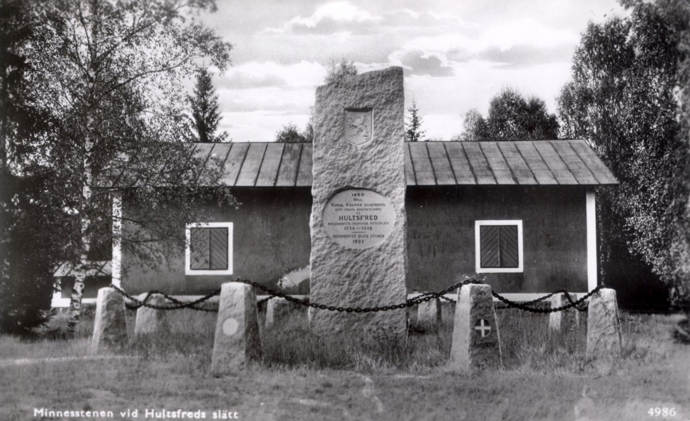 Minnessten rest 1927 vid Hultsfreds slätt till minne av Kalmar regemente.